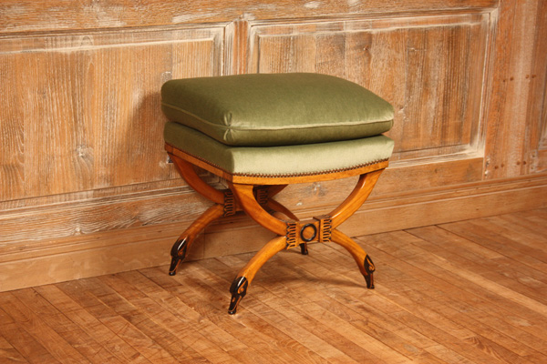 Pouf en ixe à coussin "Col de Cygne" de style Empire, réplique d'un modèle ancien réalisé par les Ateliers Allot Frères.